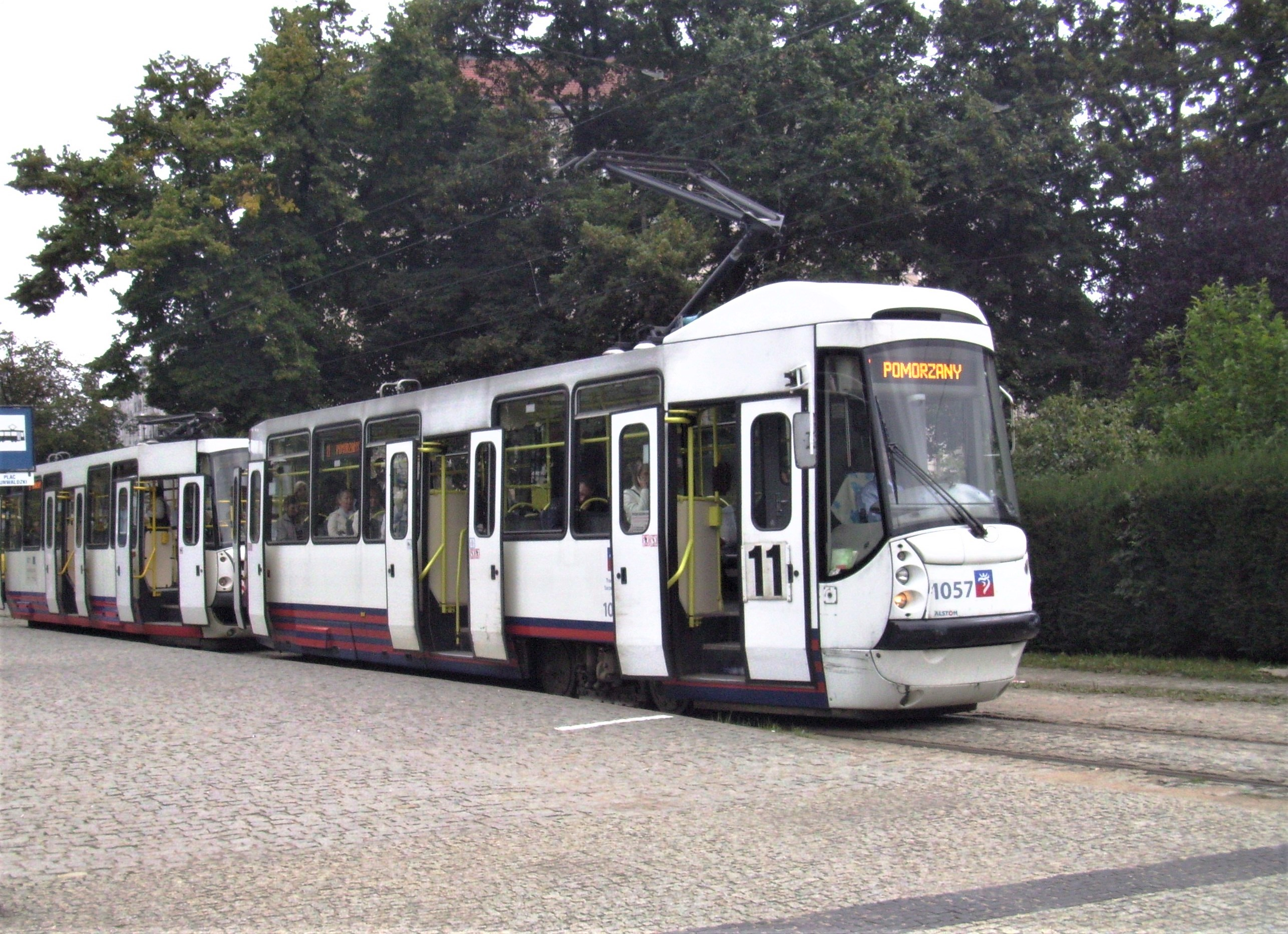 Modernizowany tramwaj 105Na